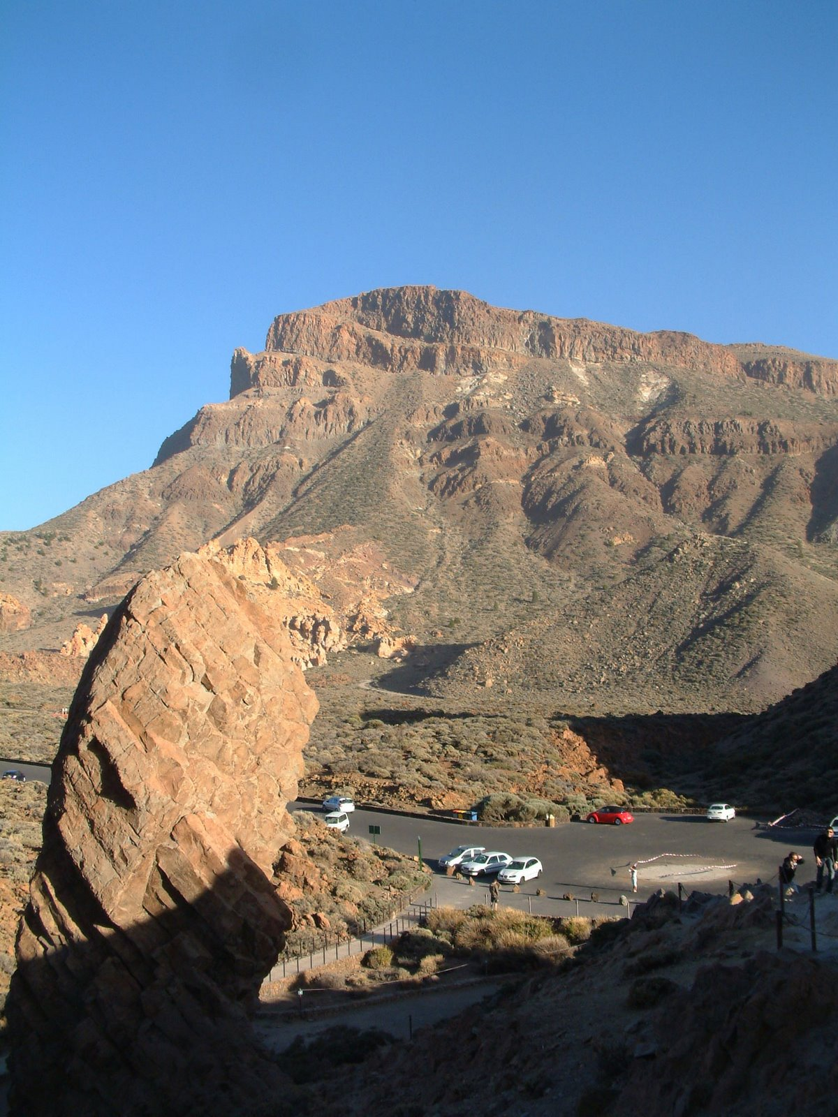 Alto de Guajara, Tenerife.